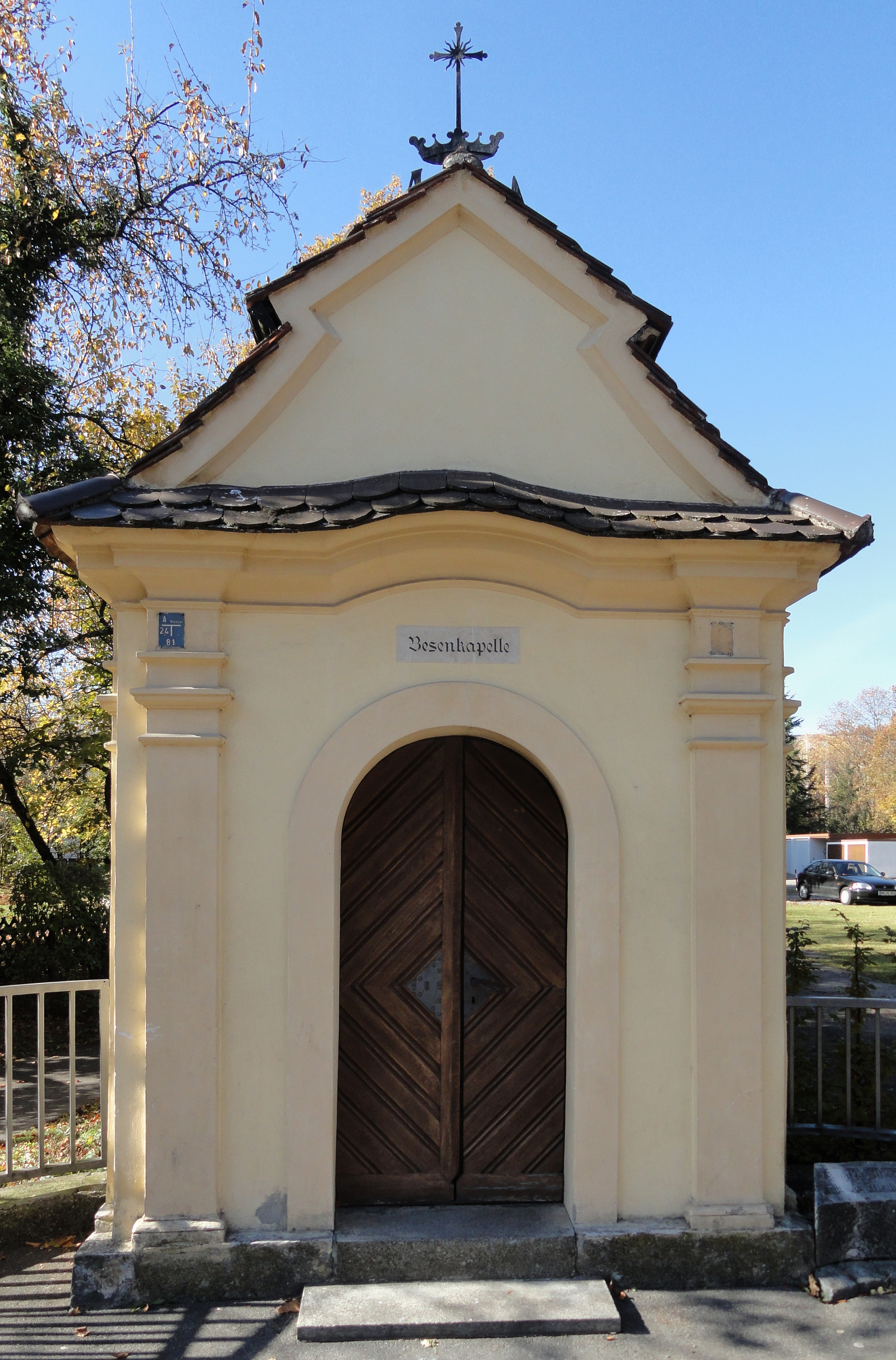 Besenkapelle in Kempten, erbaut im Jahr 1740 für Franz Georg Hermann.